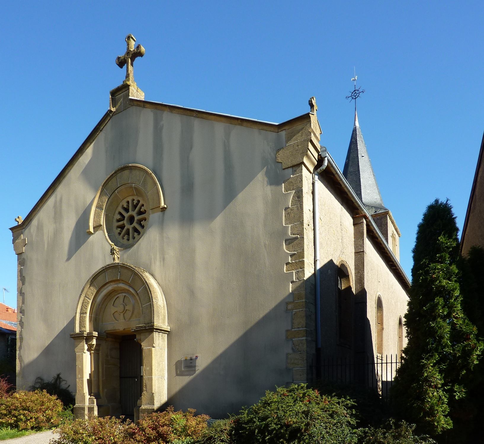 Église Saint-Auteur de Rezonville